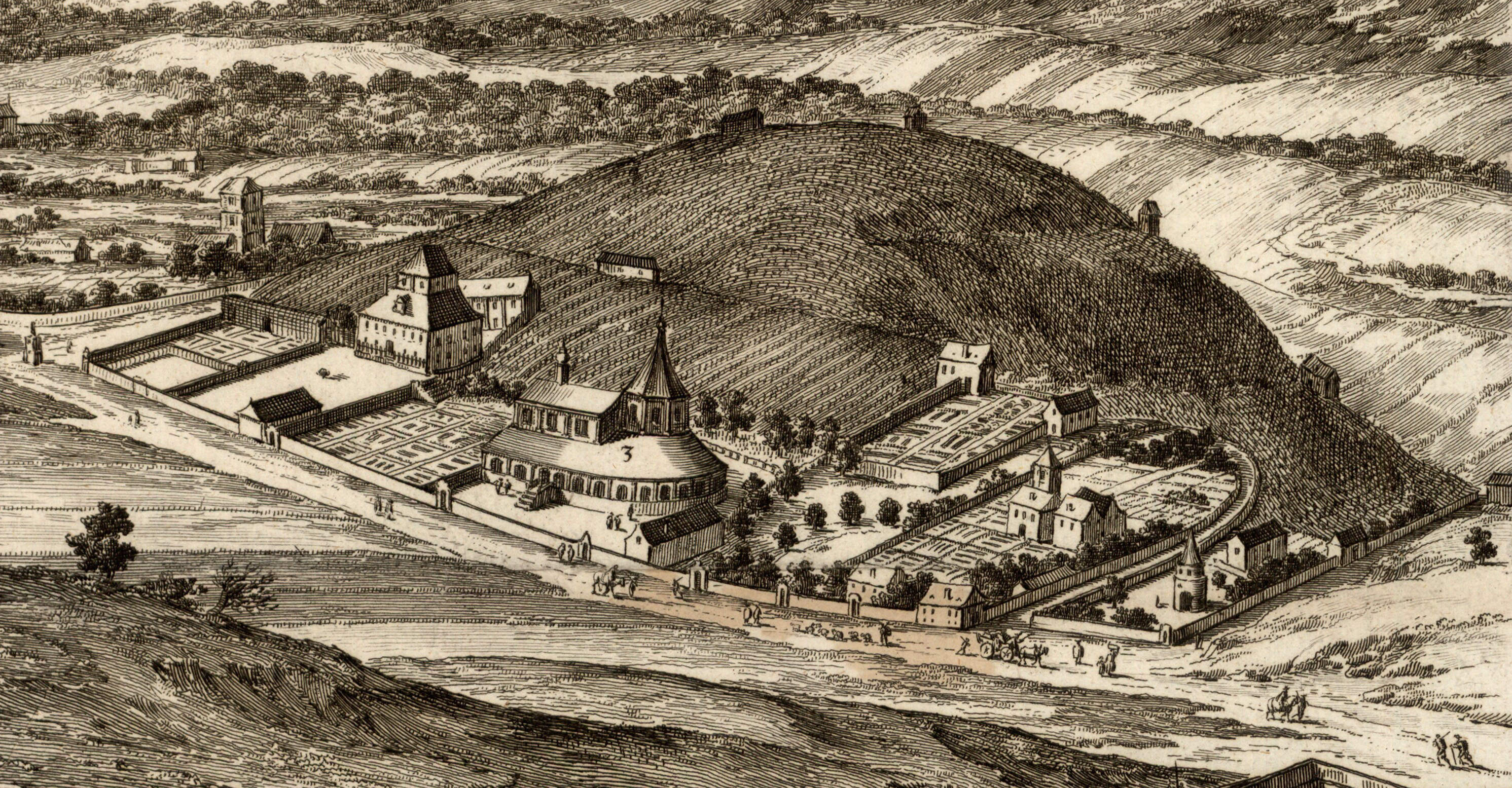 Kaple Panny Marie Altöttinské, Praha 6 - Břevnov, na vedutě Praga caput Regni Bohemiae od Folperta van Ouden Allen, před rokem 1685; původní titulek: Theatinský (Kajetánský) kostel za hradbami města, který založila Jeho Excelence Hrabě z Martiniců, Nejvyšší purkrabí.